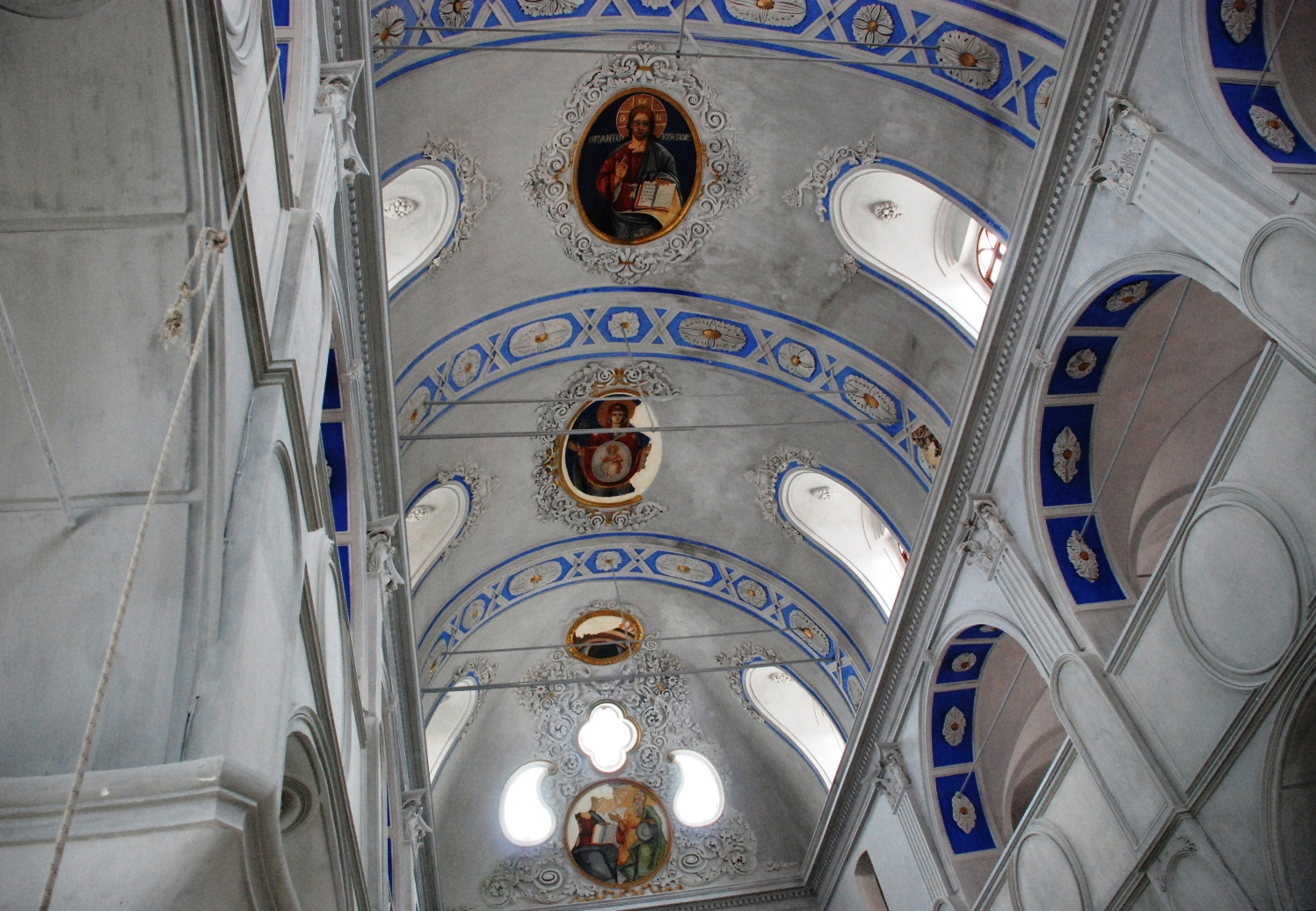 Ayios Harambolos Kirche Cesme